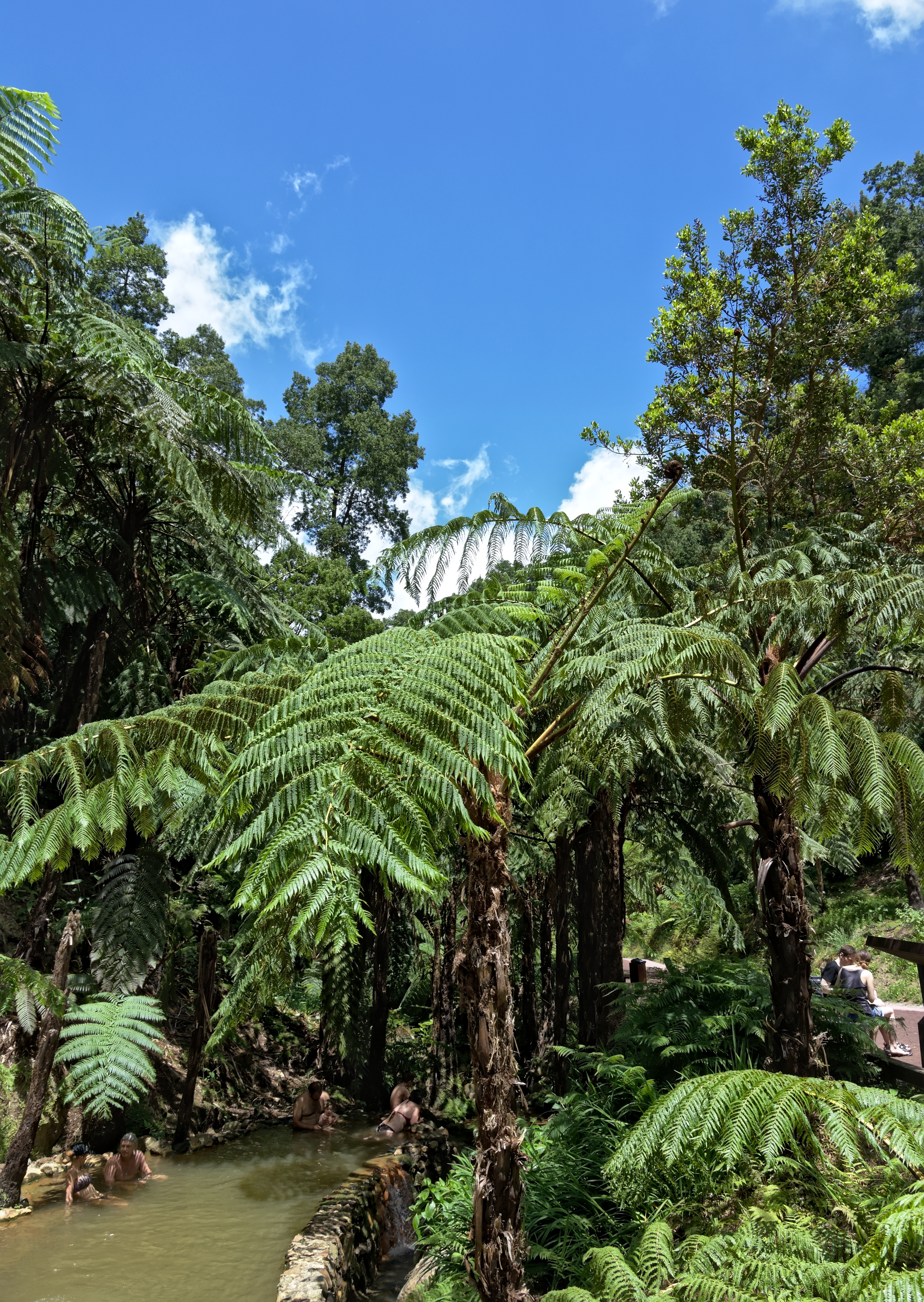 Сан-Мигел - Горячие источники